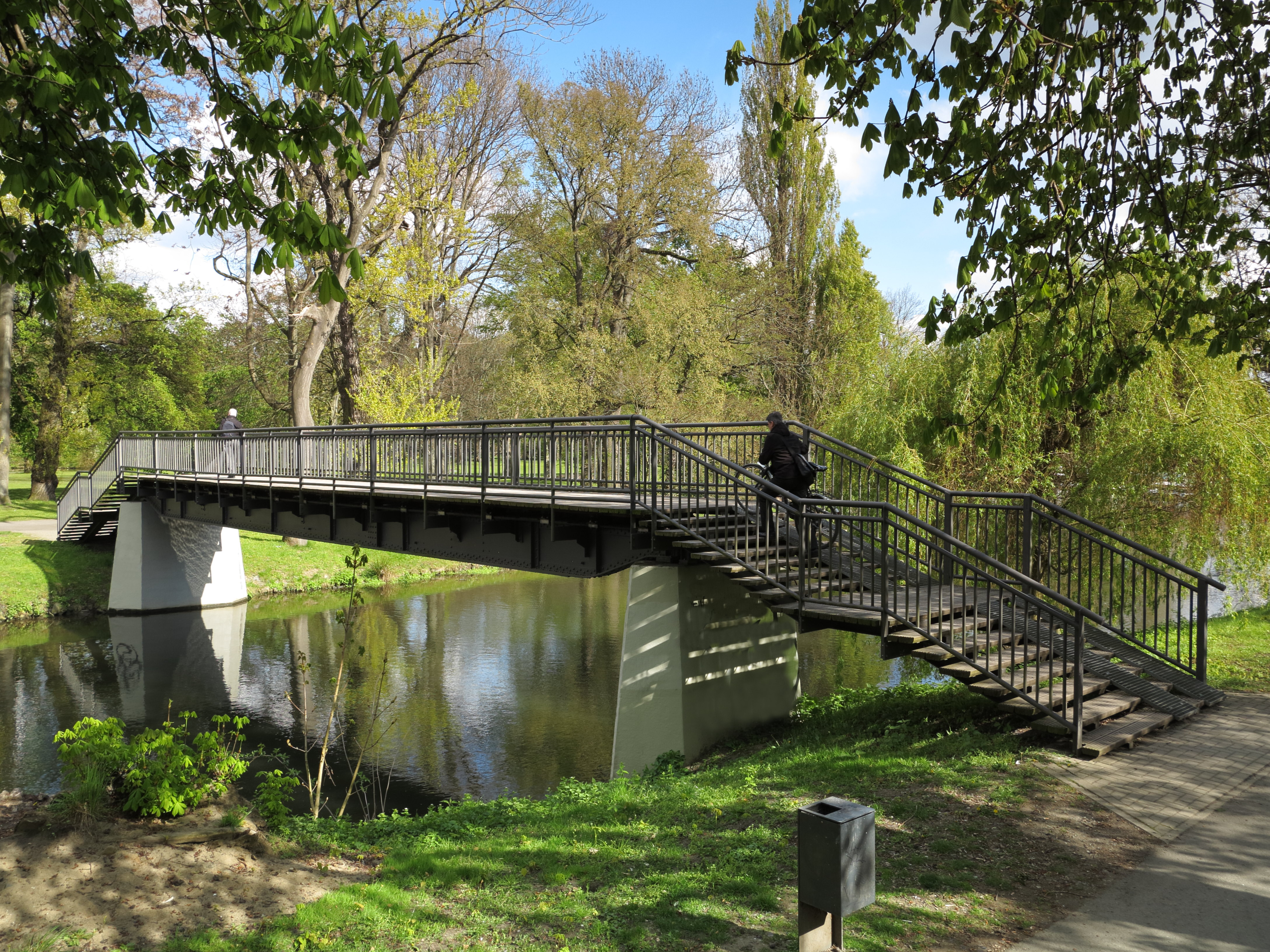 Braunschweig: die Oker-Brücke Werkstättenweg im Bürgerpark. Die Fuß- und Radwegbrücke wurde 1949 erbaut und besitzt Widerlager aus Beton, einen Überbau aus genieteten Stahlträgern sowie einen Holzbohlenbelag.